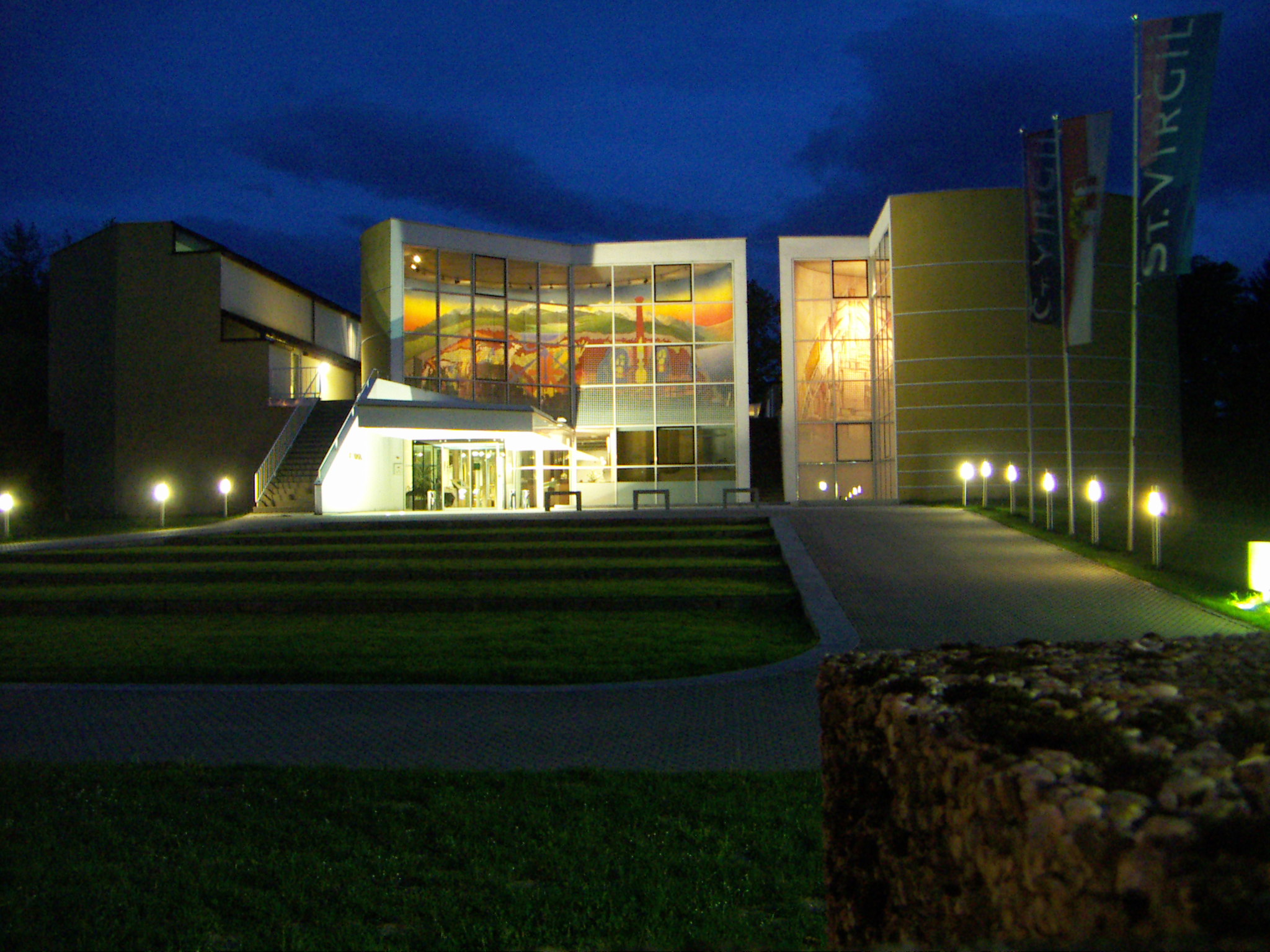 Bildungshaus Salzburg St. Virgil, Haupteingang, links das Lernatelier mit einem Wandbild von Peter Pongratz, rechts die Kapelle mit einem Wandbild von Josef Mikl